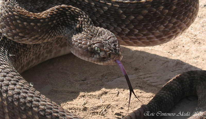 Crotalus scutulatus scutulatus en estado silvestre.